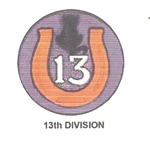 Division (Militär)